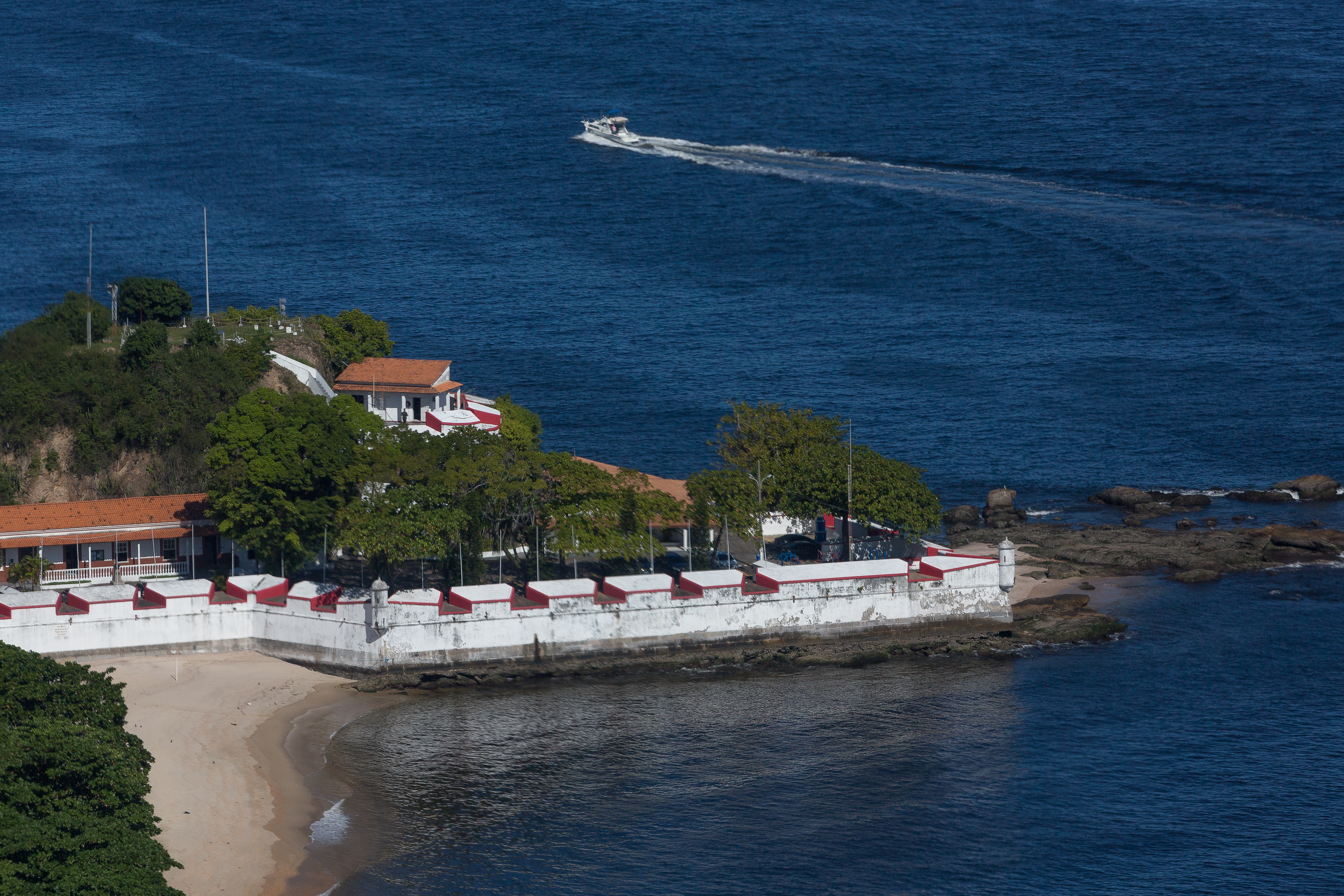 Vista aérea do Forte de São Domingos de Gragoatá localizado na cidade de Niterói - RJ - Brasil.